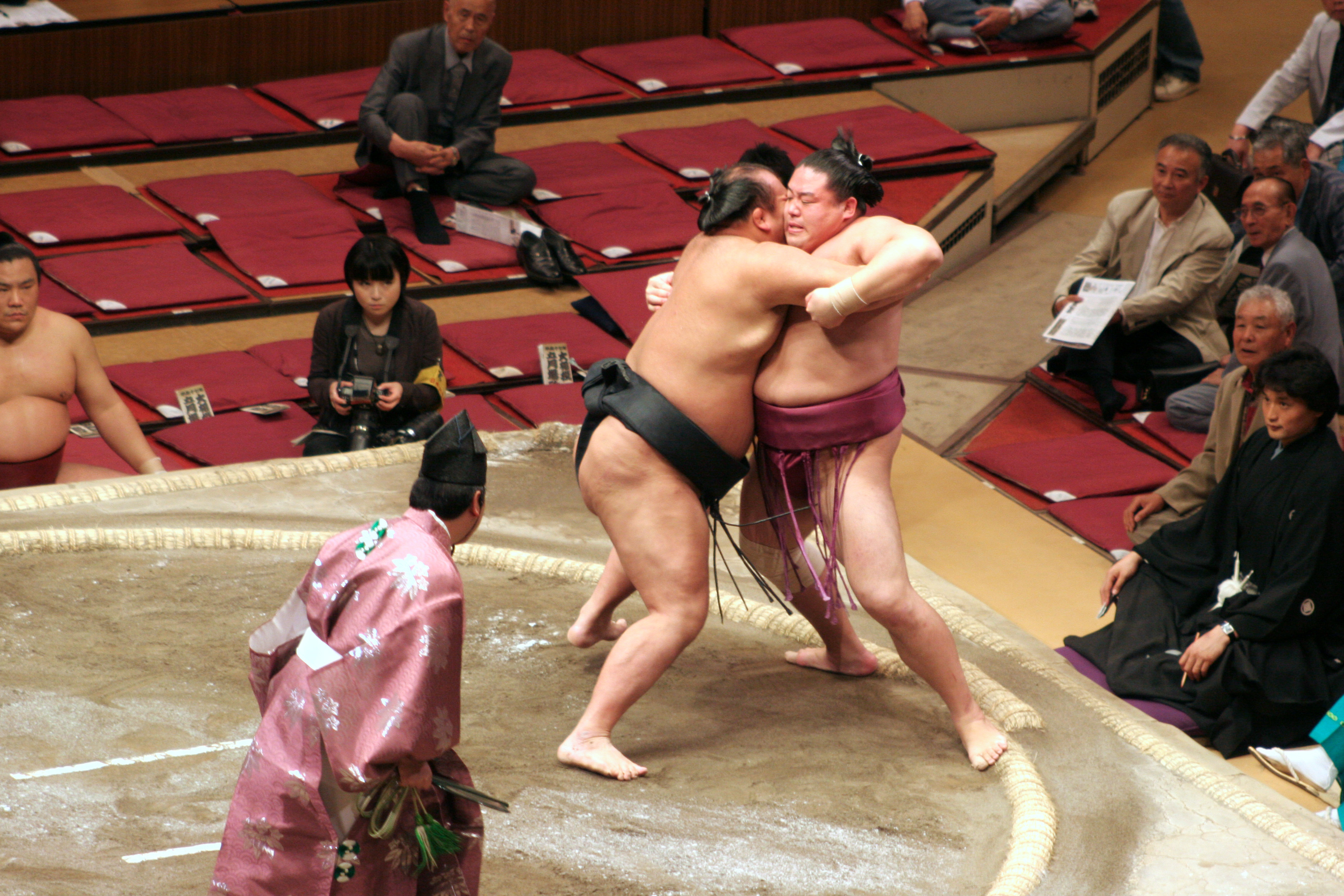 japon, tokyo, combat sumo